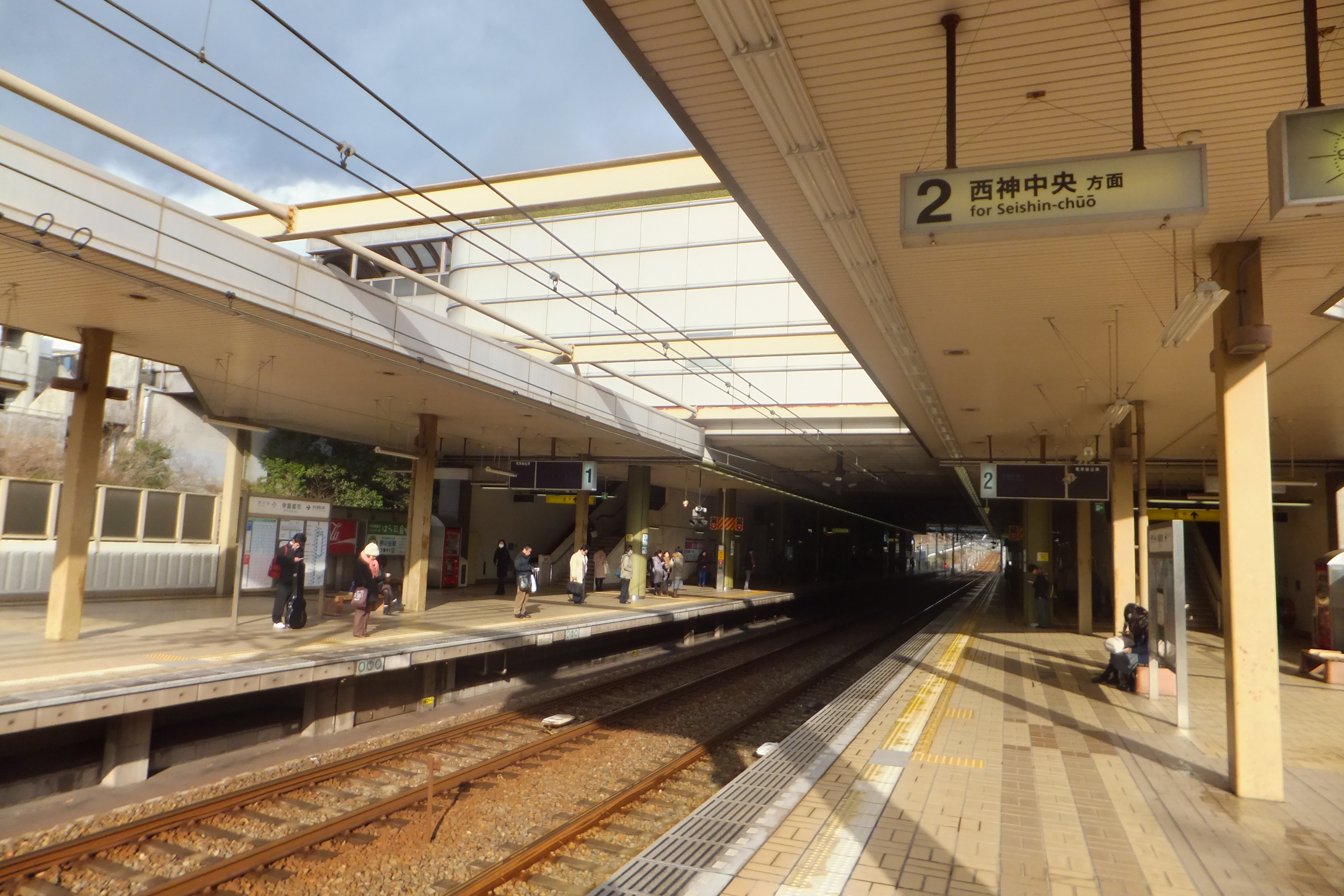 学園都市駅（2014年3月6日）